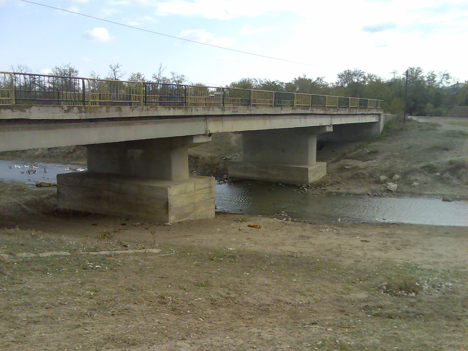 Comuna Largu,jud. Buzau- raul calmatui care trece pe langa localitate